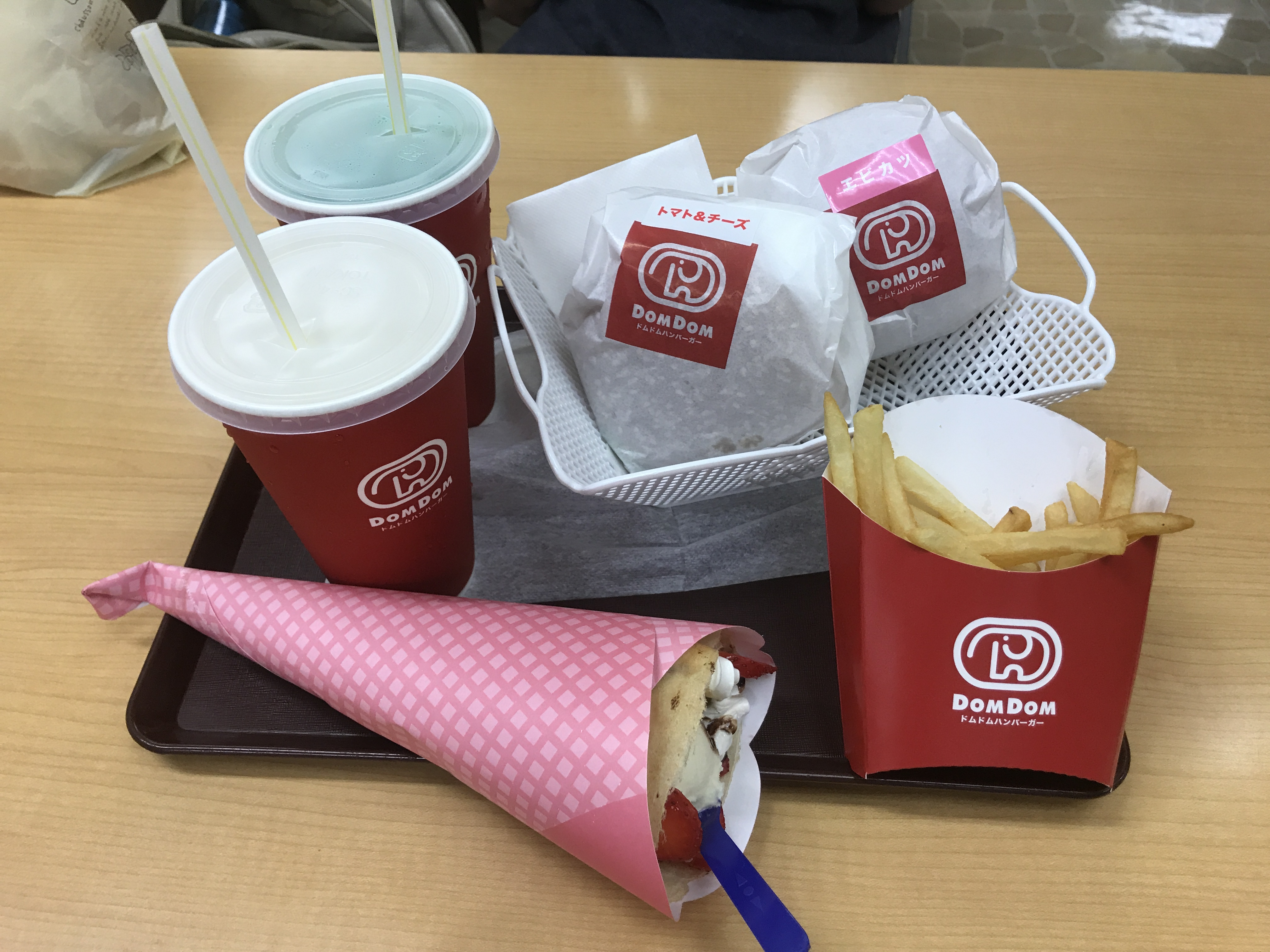 ドムドムバーガーの商品。左下よりアイスイチゴチョコクレープ、トマト＆チーズバーガー、エビカツバーガー、フライドポテト。 2019年8月末で閉店した、広島県最後のドムドムバーガーショップ；天満屋ハピータウン府中店にて撮影。